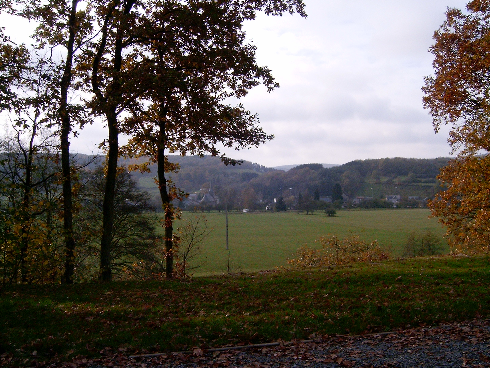 Ardennes Ardennes